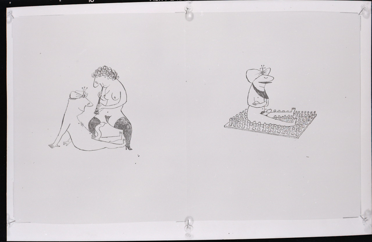 Servizio fotografico : Italia, 1960 / Paolo Monti. - Buste: 1, Fototipi: 8 : Negativo b/n, gelatina bromuro d'argento/ pellicola ; 6x9. - ((Serie costituita da 1 busta di negativi sciolti identificati con i nn.: 15152, 15153, 15154, 15155, 15156, 15157, 15158, 15159, e non identificabili singolarmente. - La busta è identificata con la numerazione 15152/167 (ma al suo interno contiene solo 8 negativi dei 16 indicati) e con l'iscrizione didascalica manoscritta a pennarello: "Disegni/ Siné". - La suddetta serie è contenuta nella scatola R15008-15193, formato 18x24, e identificata con l'iscrizione didascalica manoscritta a pennarello nero: "Artisti O/Z". - Il lavoro potrebbe essere stato eseguito per la X Triennale di Milano, 1954 (confronta scheda R21132-21149)